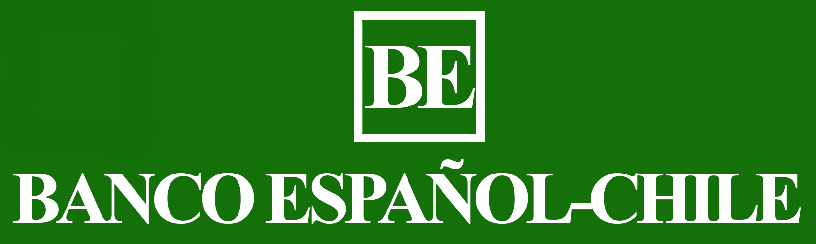 Símbolo del Banco Español-Chile en los años 1980s.